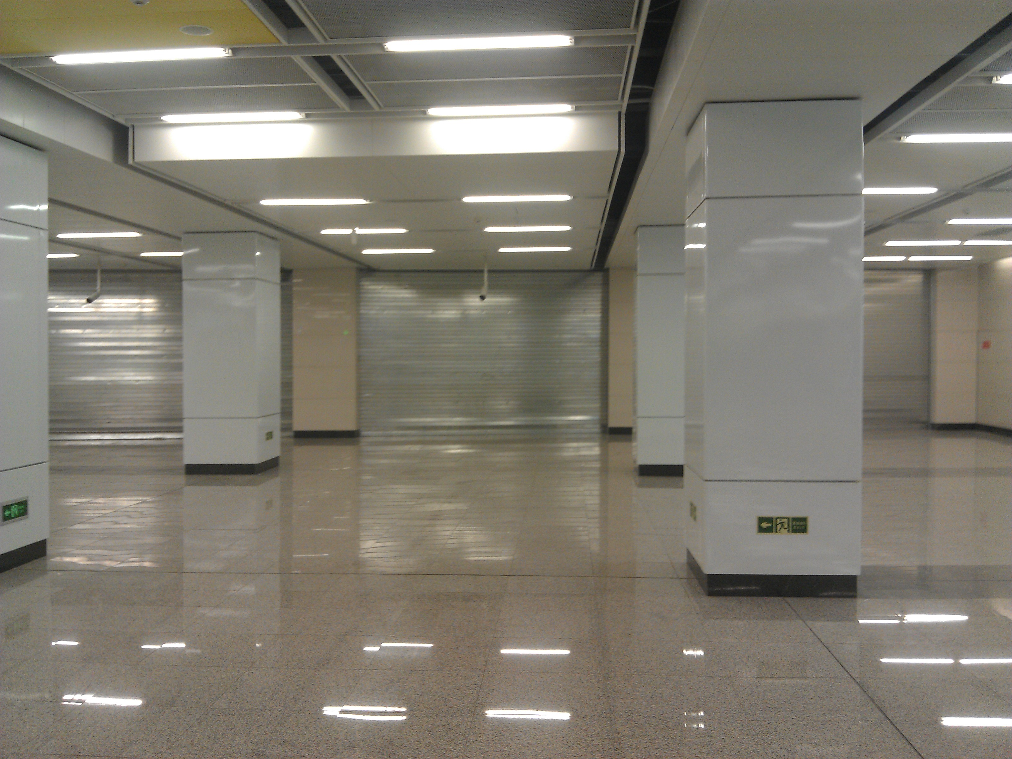 北京地铁七里庄站14号线预留